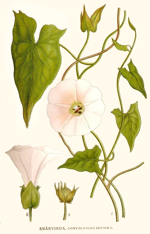 Convolvulus sepium (L.) R. Br. Original Description Snårvinda, Convolvulus sepium L.